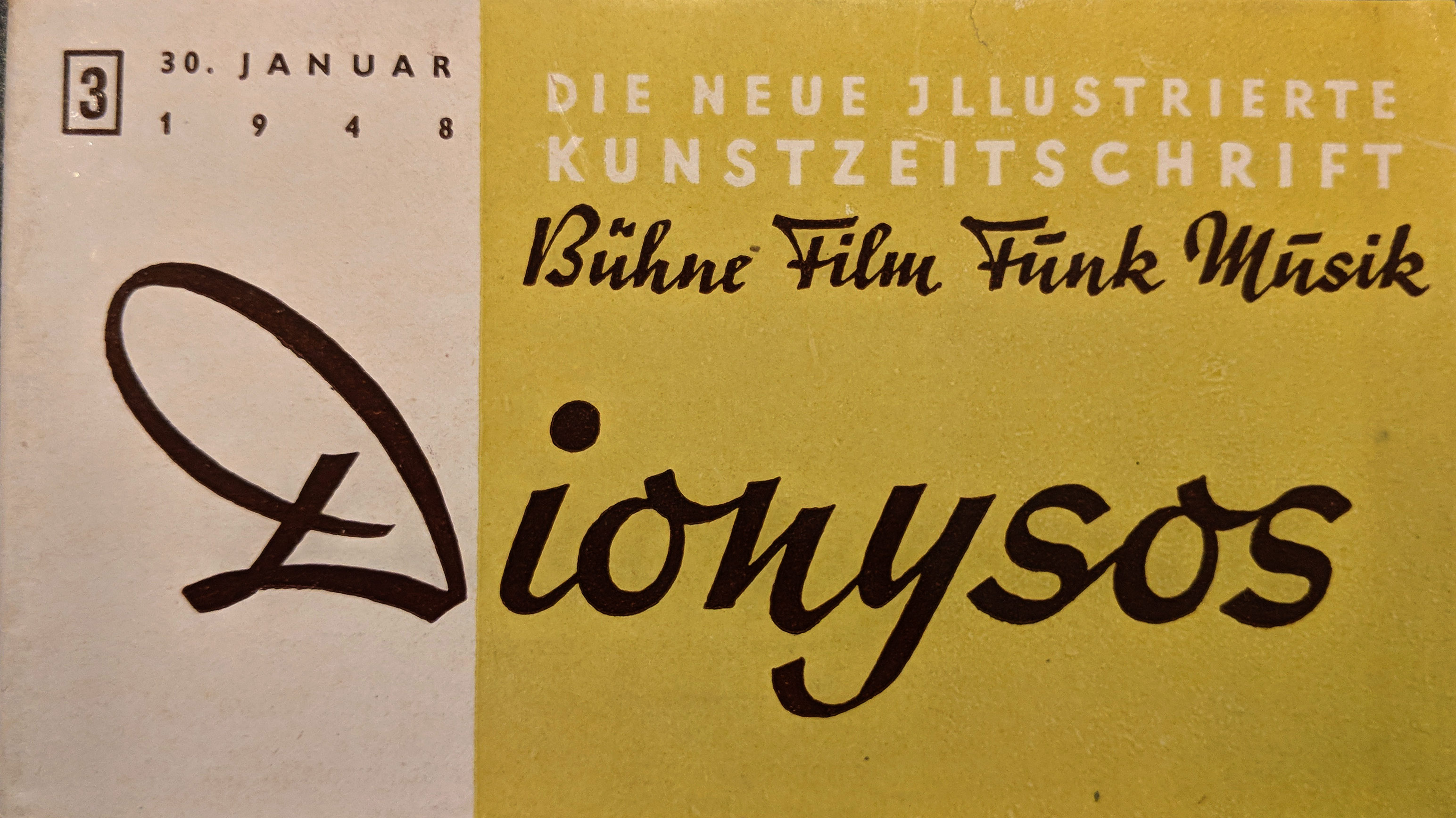 Titel-Schriftzug der Kunst- und Kulturzeitschrift Dionysos, Ausgabe vom 30. Januar 1948